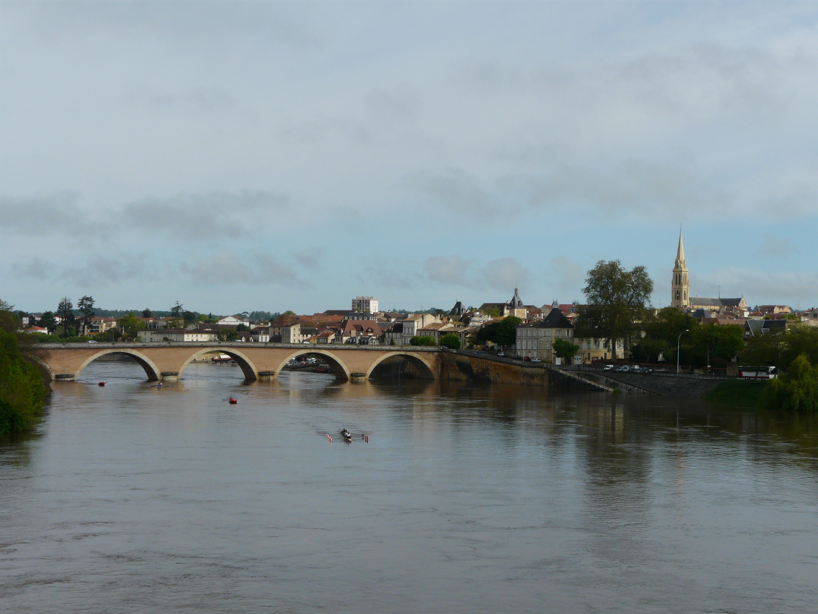 La Dordogne en crue, Bergerac, Dordogne, France.